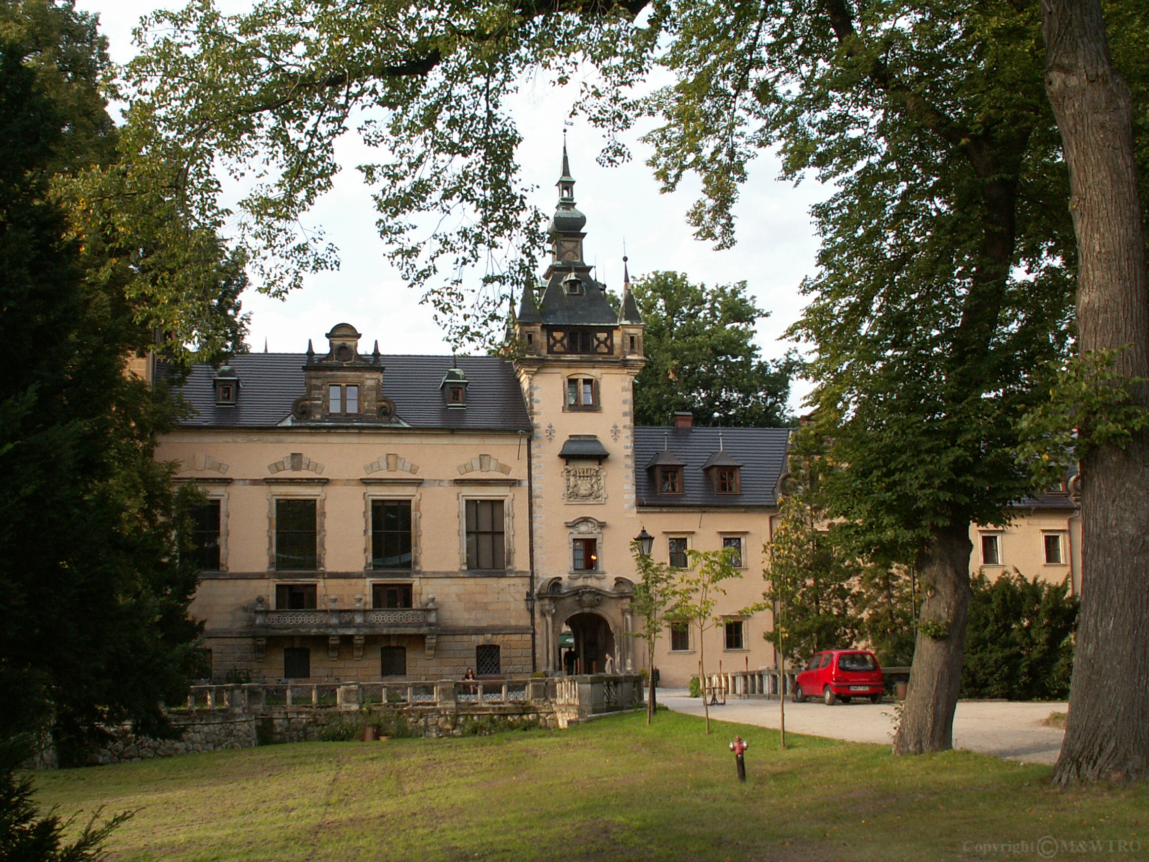 Pałac w Kliczkowie, gmina Osiecznica, pow. bolesławiecki